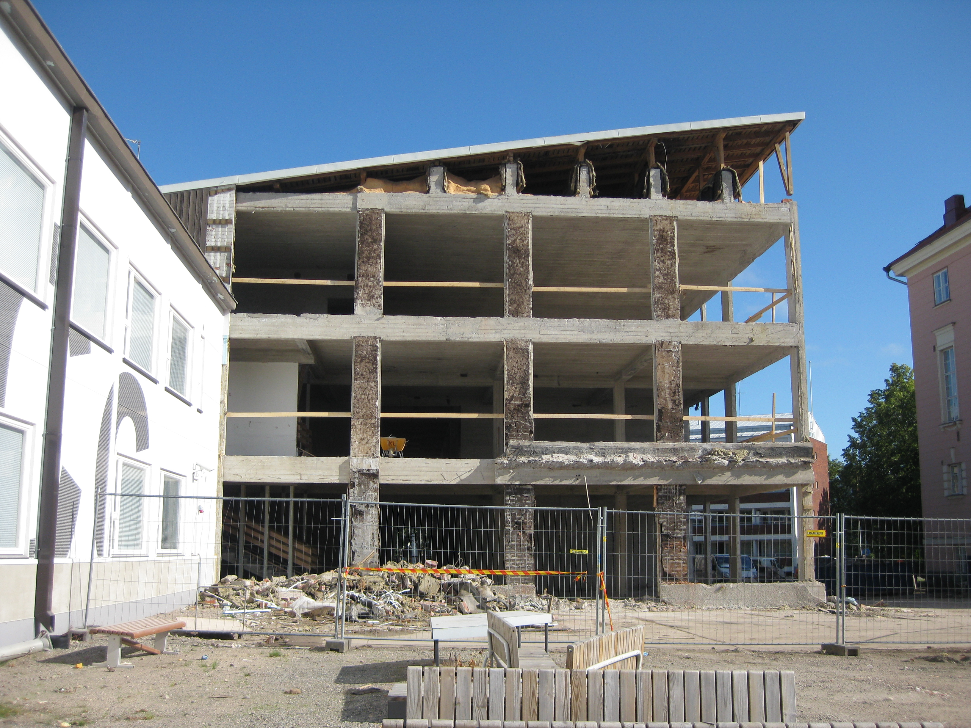 Cygnaeuksen koulukeskuksen välitalon purku